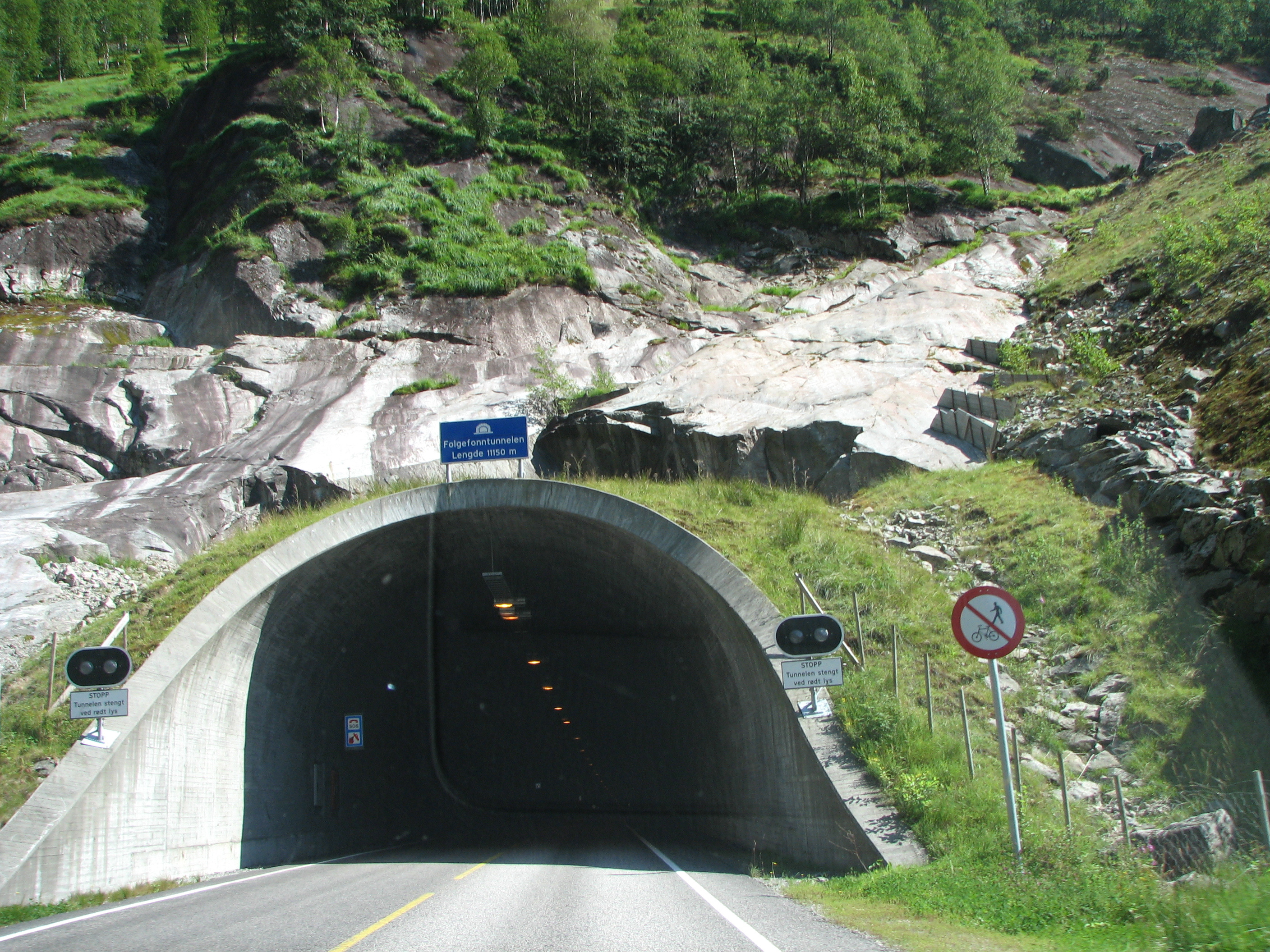 Folgefonntunnelen - the western portal